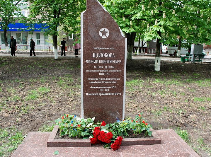 Memorial sign